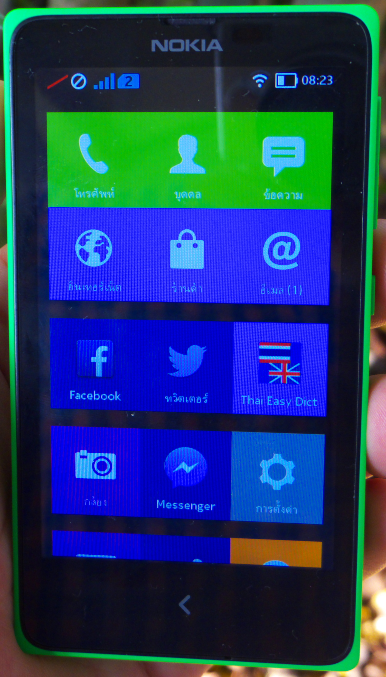 My green Nokia X